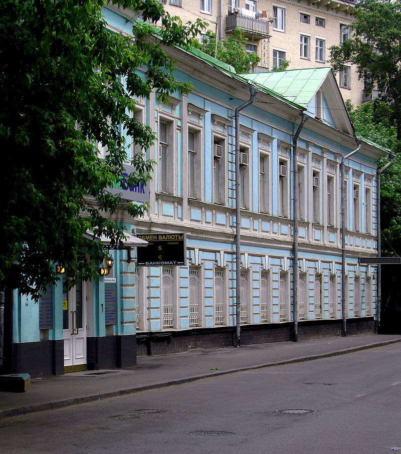 Moscow, Podsosensky Lane, 17